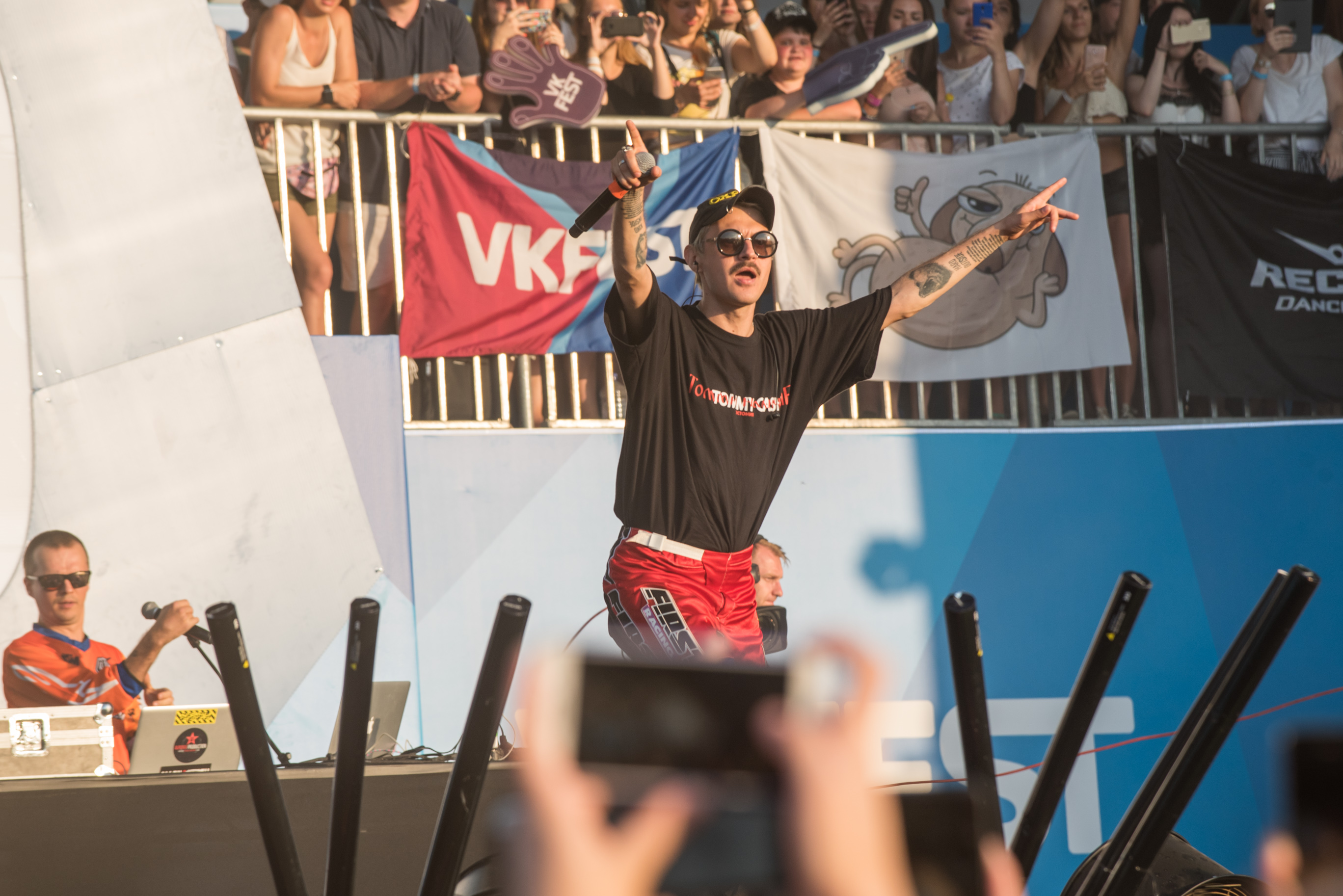 Илья Прусикин (Little Big) на VK Fest 2018